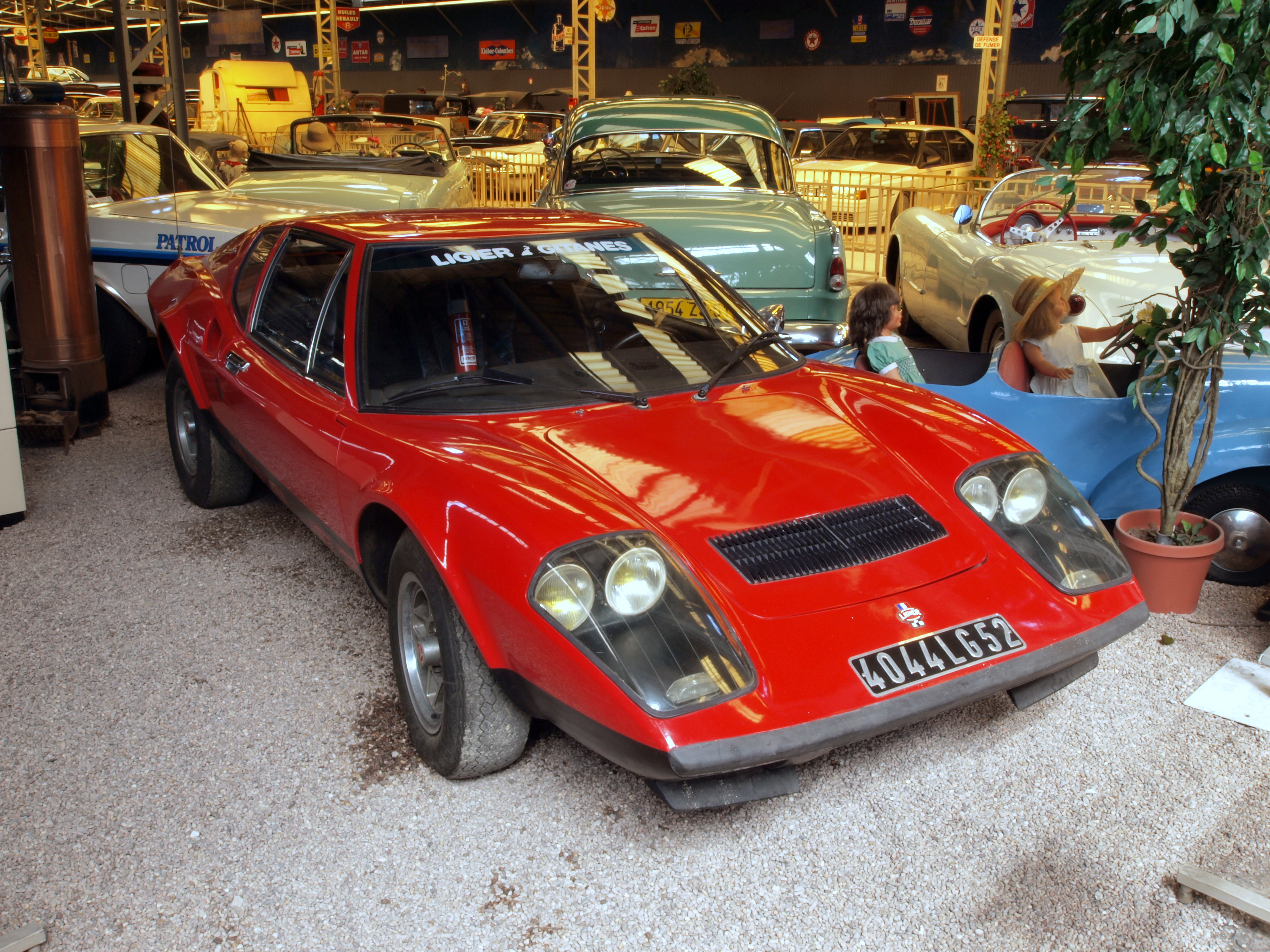 1974 Ligier JS2